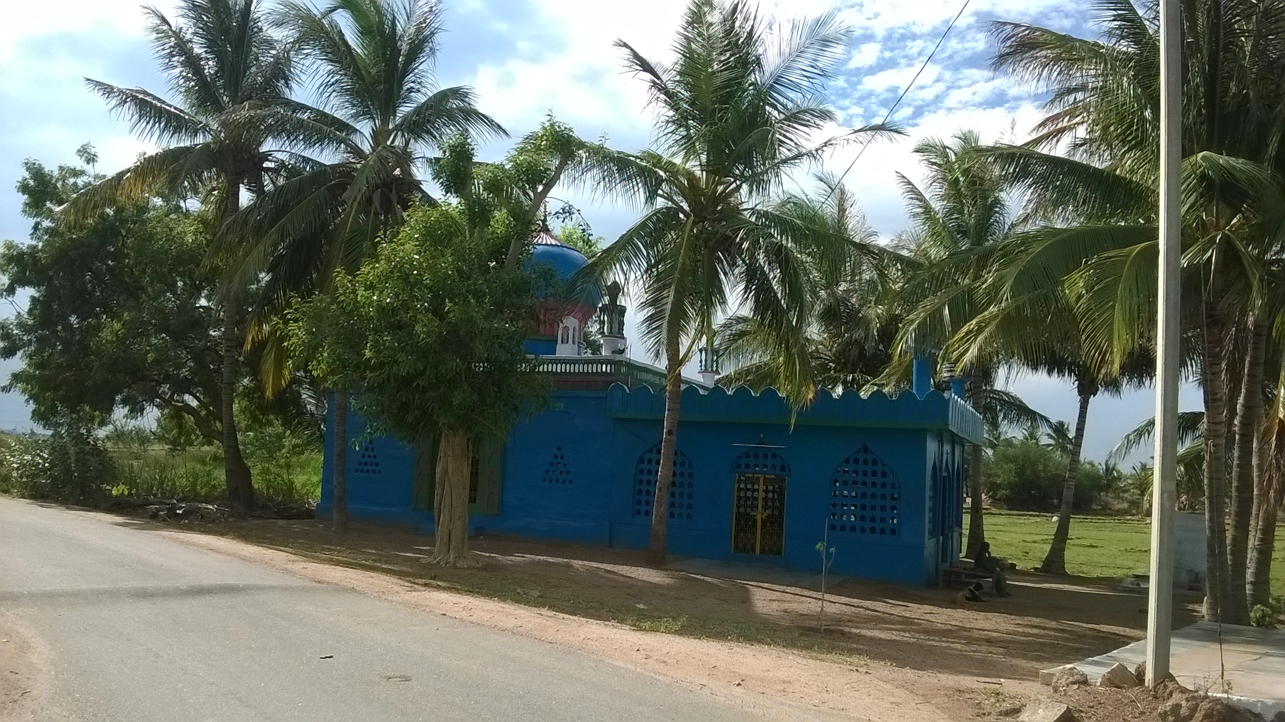 సుల్తాన్ అలీసా బాబా చిస్తీ